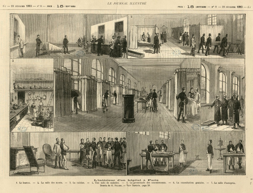 L'intérieur d'un hôpital à Paris